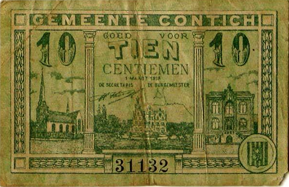 Noodgeld, Eerste Wereldoorlog - Kontich